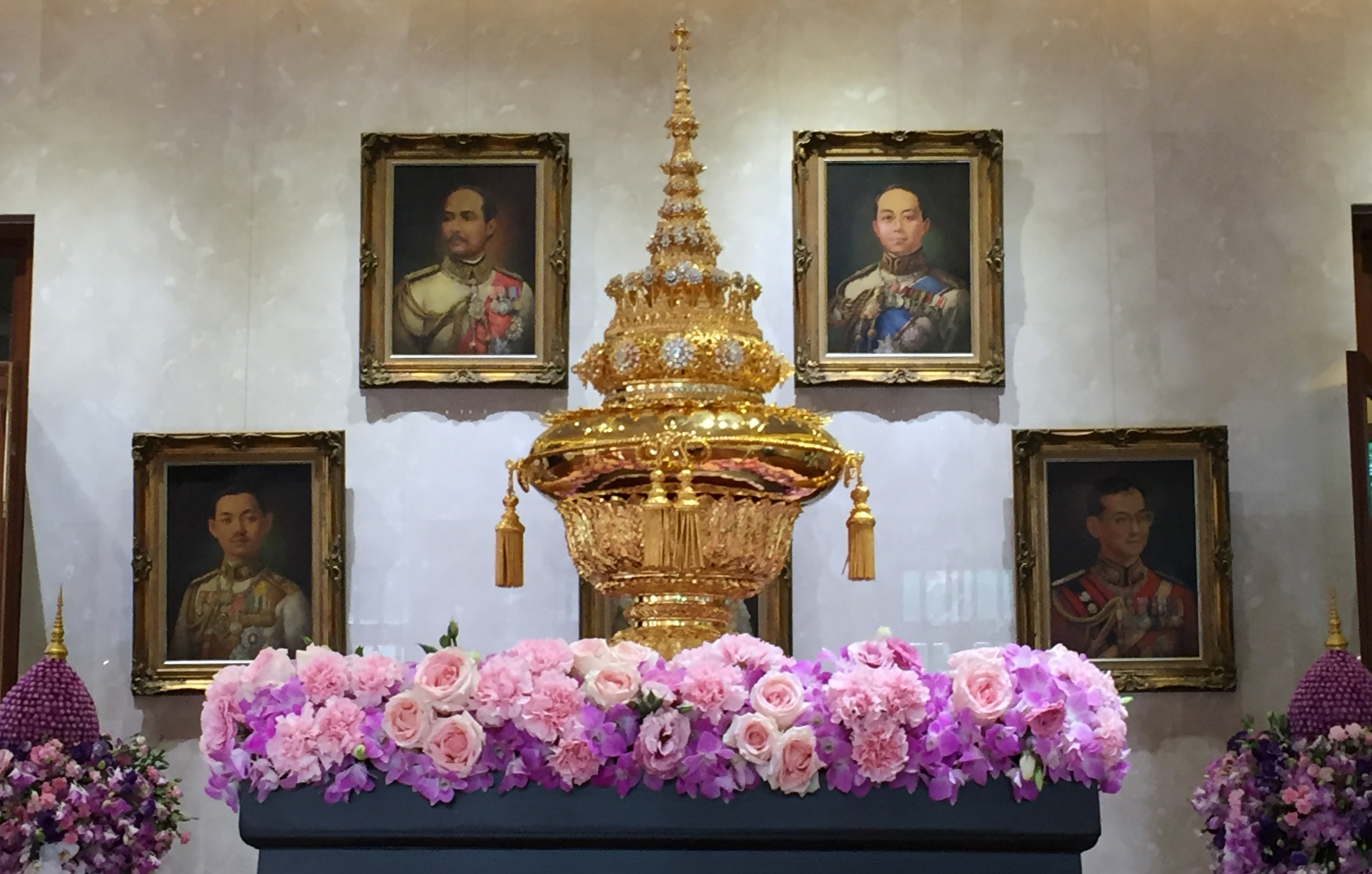 พระเกี้ยว สัญลักษณ์ประจำจุฬาลงกรณ์มหาวิทยาลัย จัดแสดง ณ หอประวัติจุฬาลงกรณ์มหาวิทยาลัย ชั้น 2 อาคารจักรพงษ์ จุฬาลงกรณ์มหาวิทยาลัยจะอัญเชิญพระเกี้ยวองค์นี้ไปในพิธีสำคัญ ๆ เท่านั้น เช่น พิธีพระราชทานปริญญาบัตร และไม่เคยปรากฎในพิธีอื่น